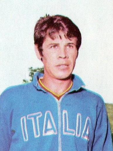 CAMPIONI dello SPORT 1969/70-n.62- GENTILE - ITALIA -ATLETICA-Rec